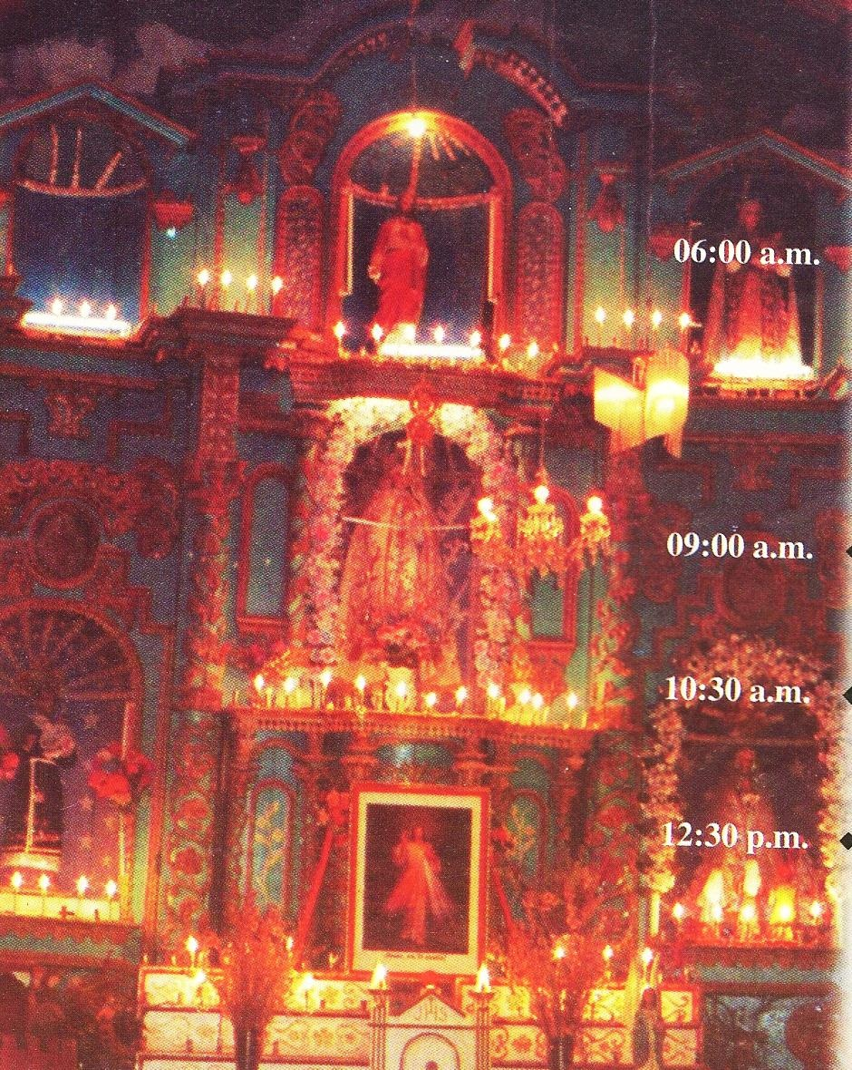 IGLESIA SAN MIGUEL ARCANGEL DE VILLA DE ARMA ( Interior )